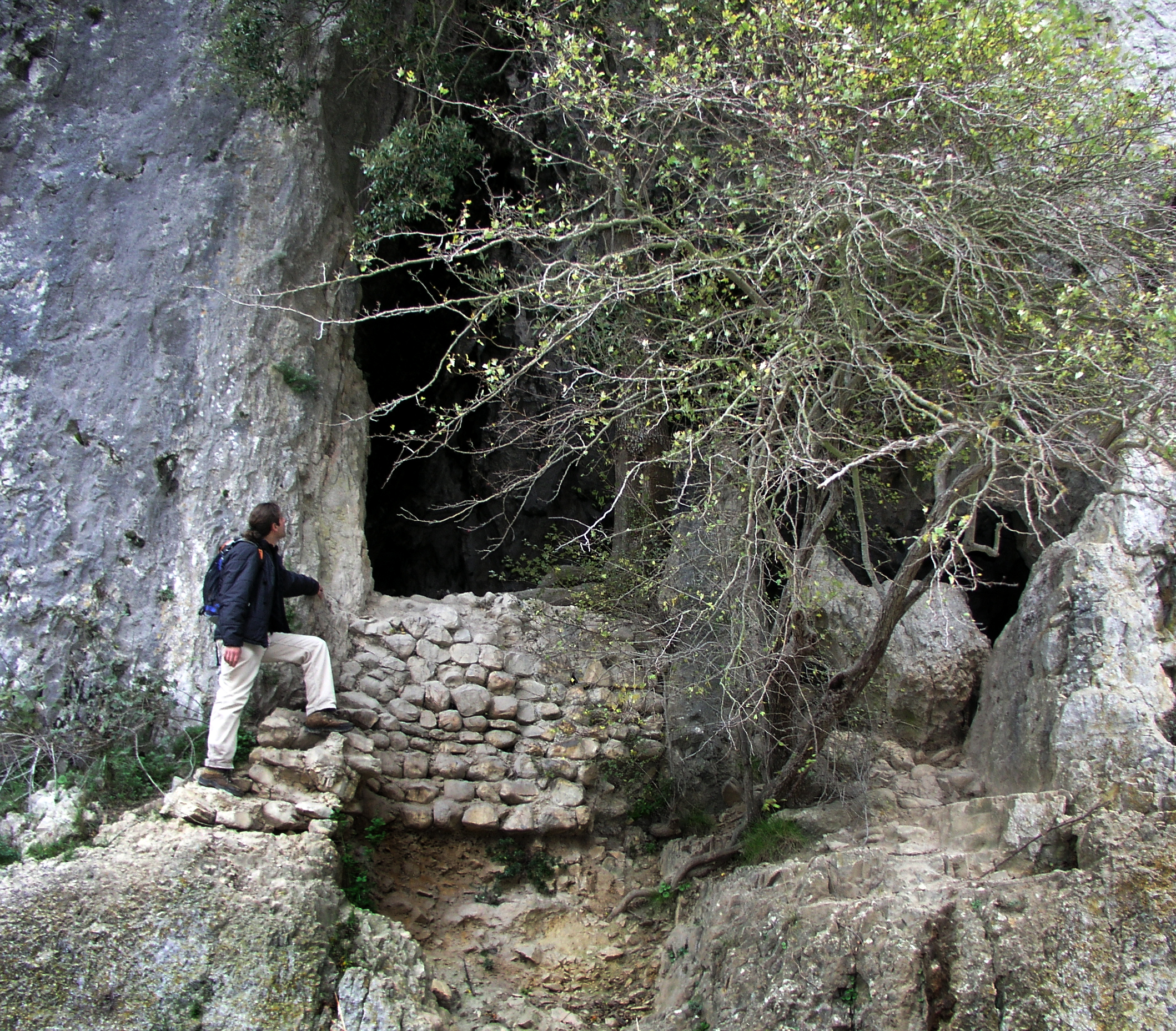 Grotte du Ranc Baratu, Lagorce, Ardèche, France.